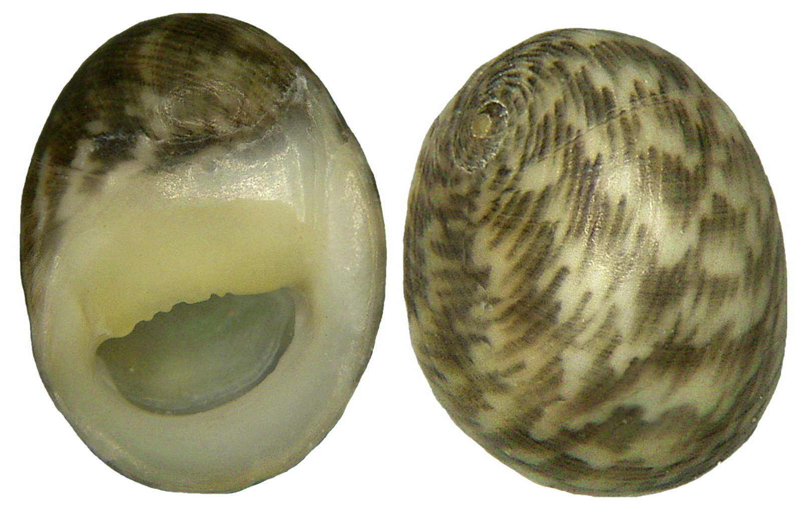 Familie: Neritidae Groesse: 20-35 mm Verbreitung: Indo-Pazifik Fundort: Kenia, Diani Beach leg.det. U.Schmidt, 1990 Photo: U.Schmidt, 2008